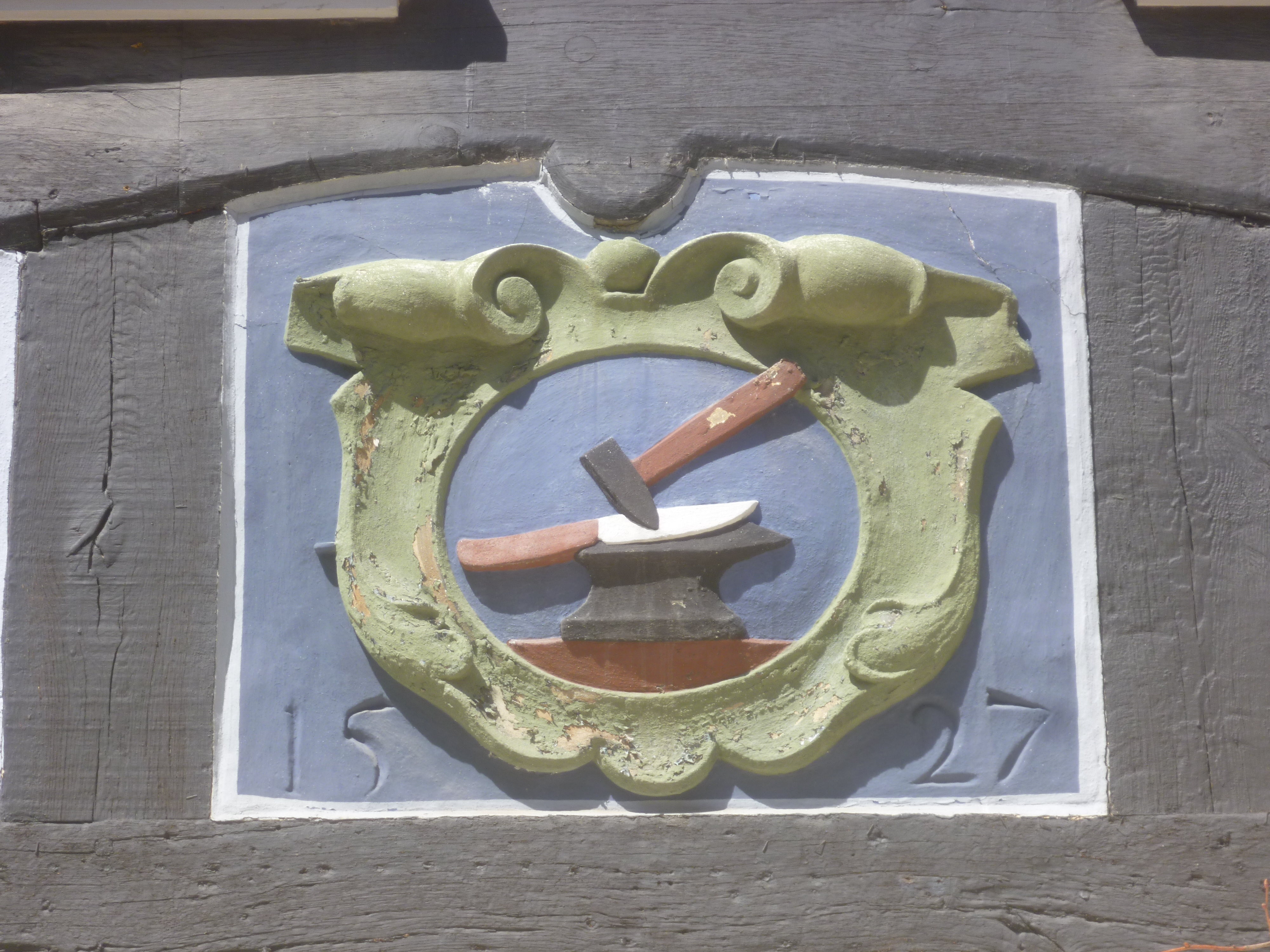 Das Schiefe Haus in Idstein - Fassadendekoration